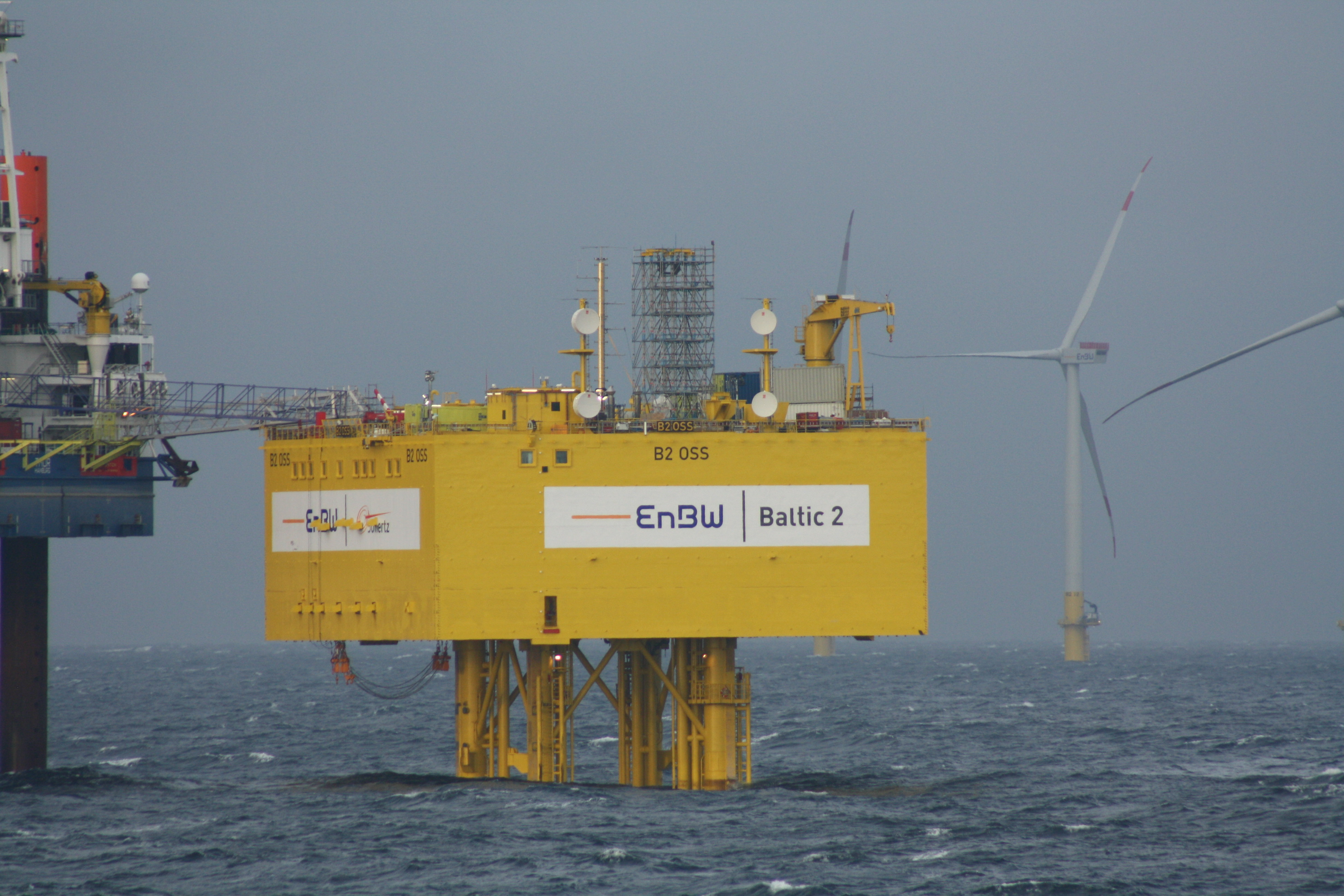 Substation in the Baltic 2 offshore wind farm area